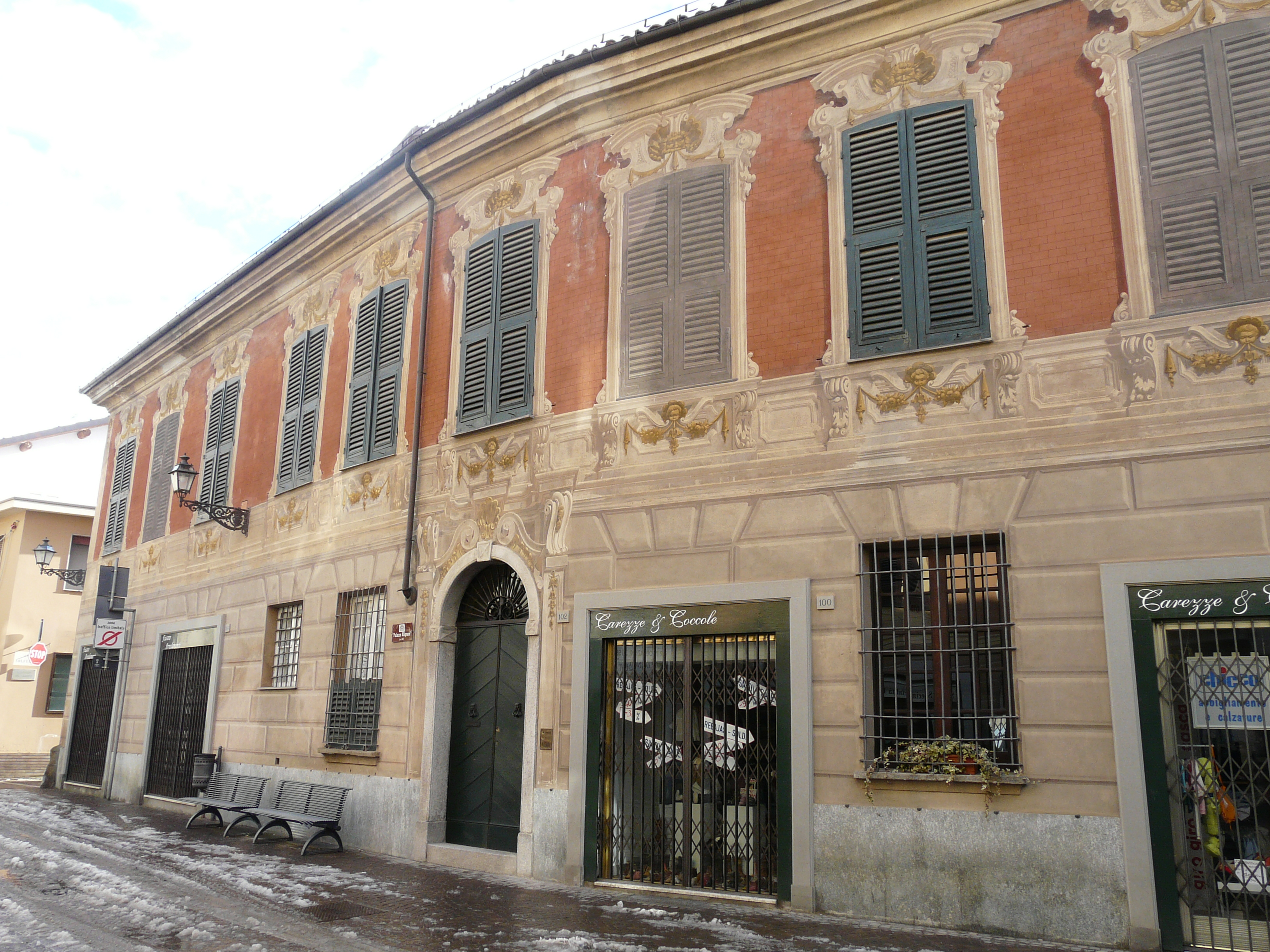 Palazzo Alignani, Novi Ligure, Piemonte, Italia